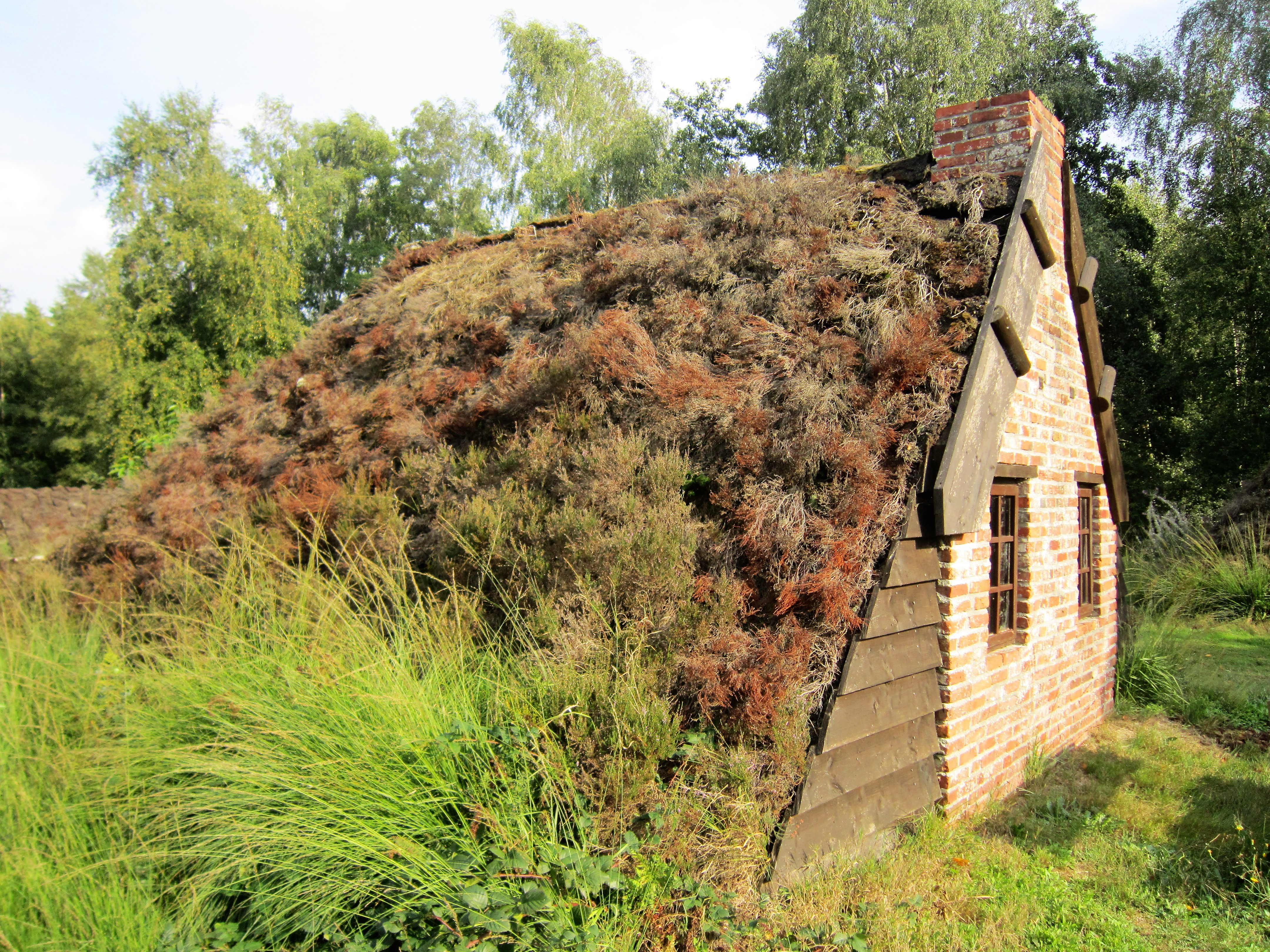 Kolonistenhaus in der Von-Velen-Anlage Papenburg